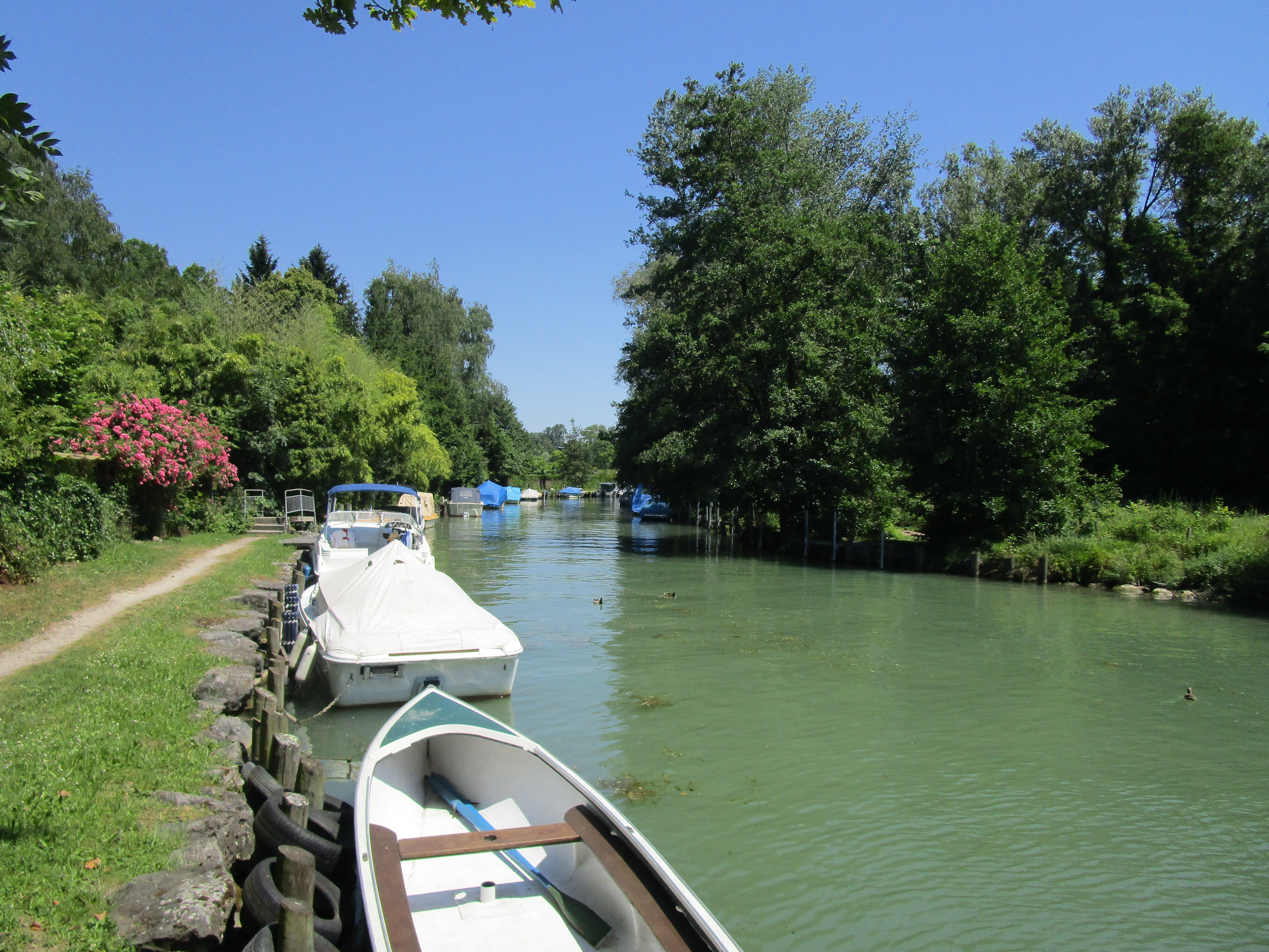 Située entre Préverenges et St. Sulpice, c'est l'embouchure de La Venoge célébrée par le poète Jean-Villard dit Gilles.